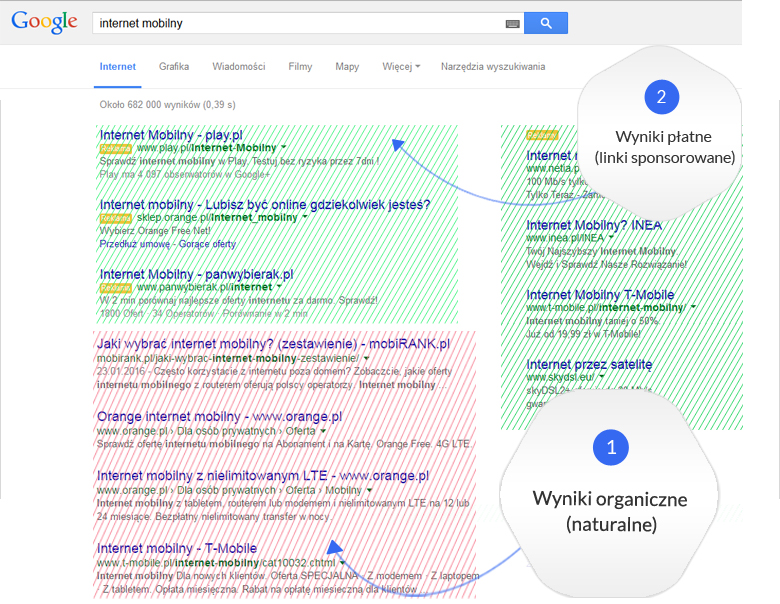 Grafika prezentująca wyniki wyszukiwania (organicze i płatne)